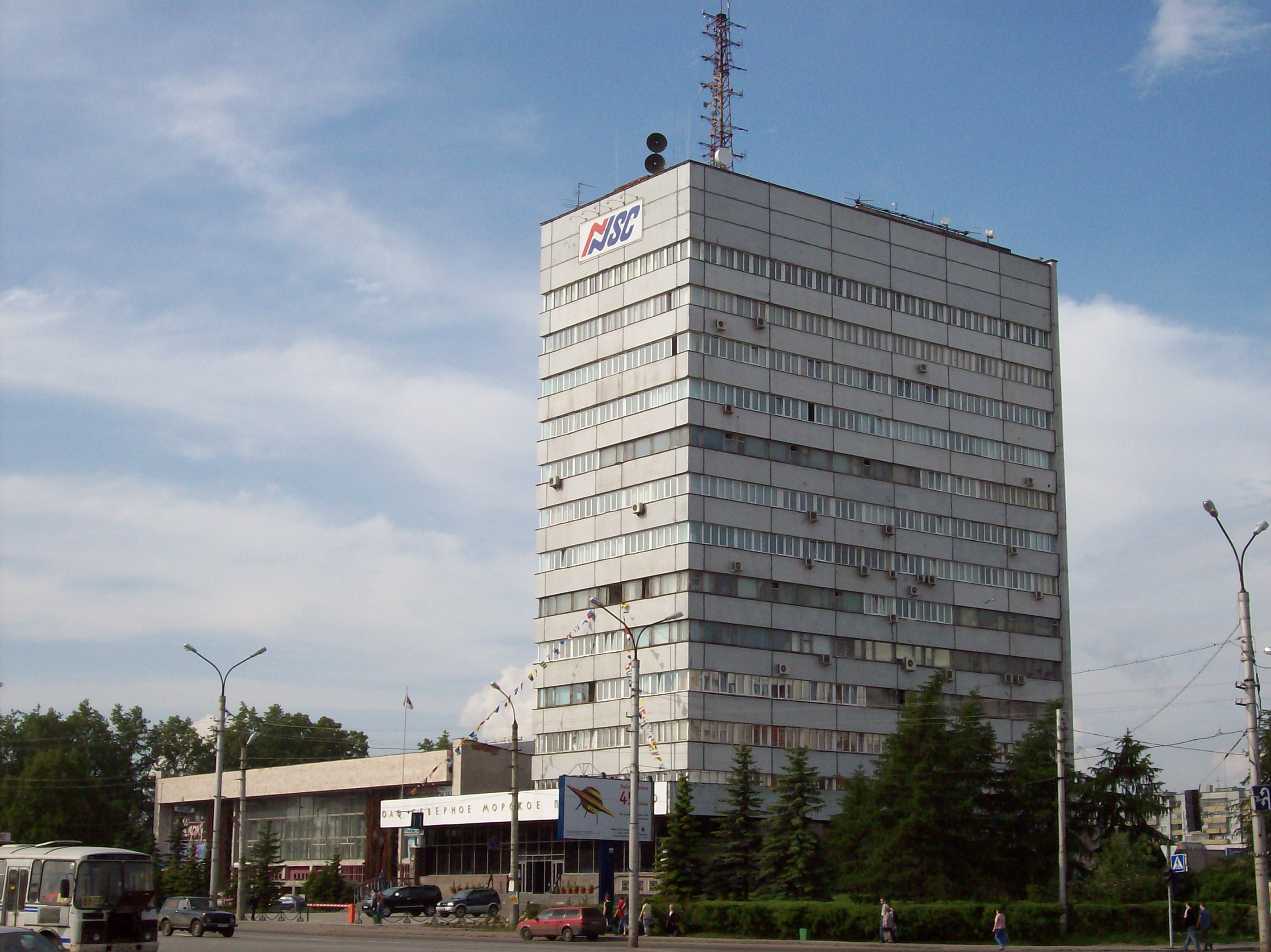 Северное морское пароходство, Архангельск.